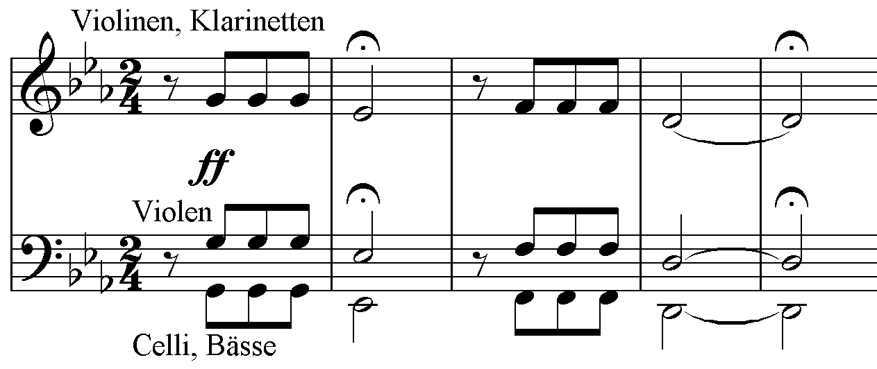 Original description